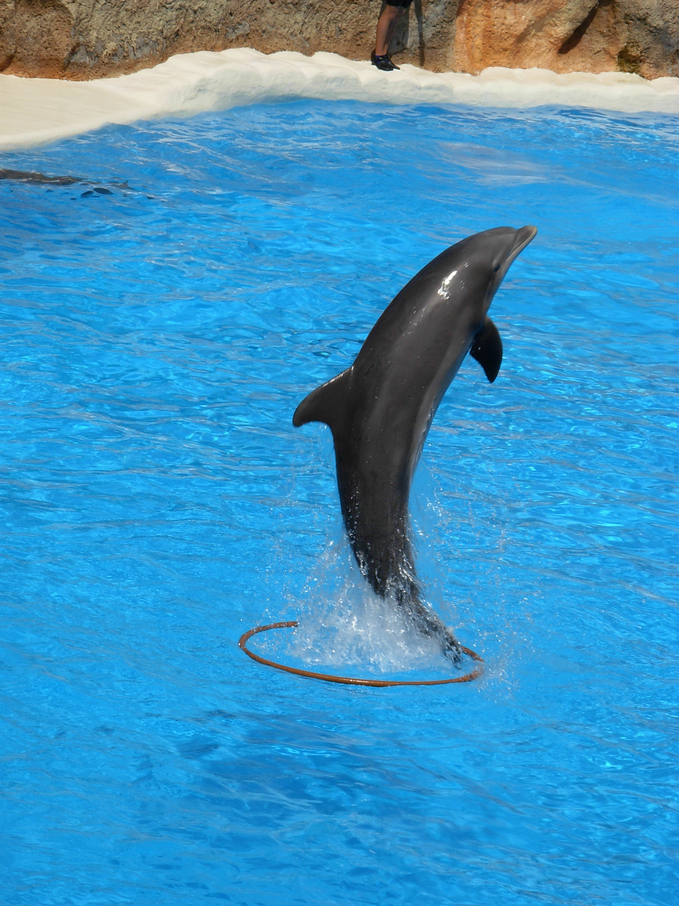 Dolphins at Loro Parque.